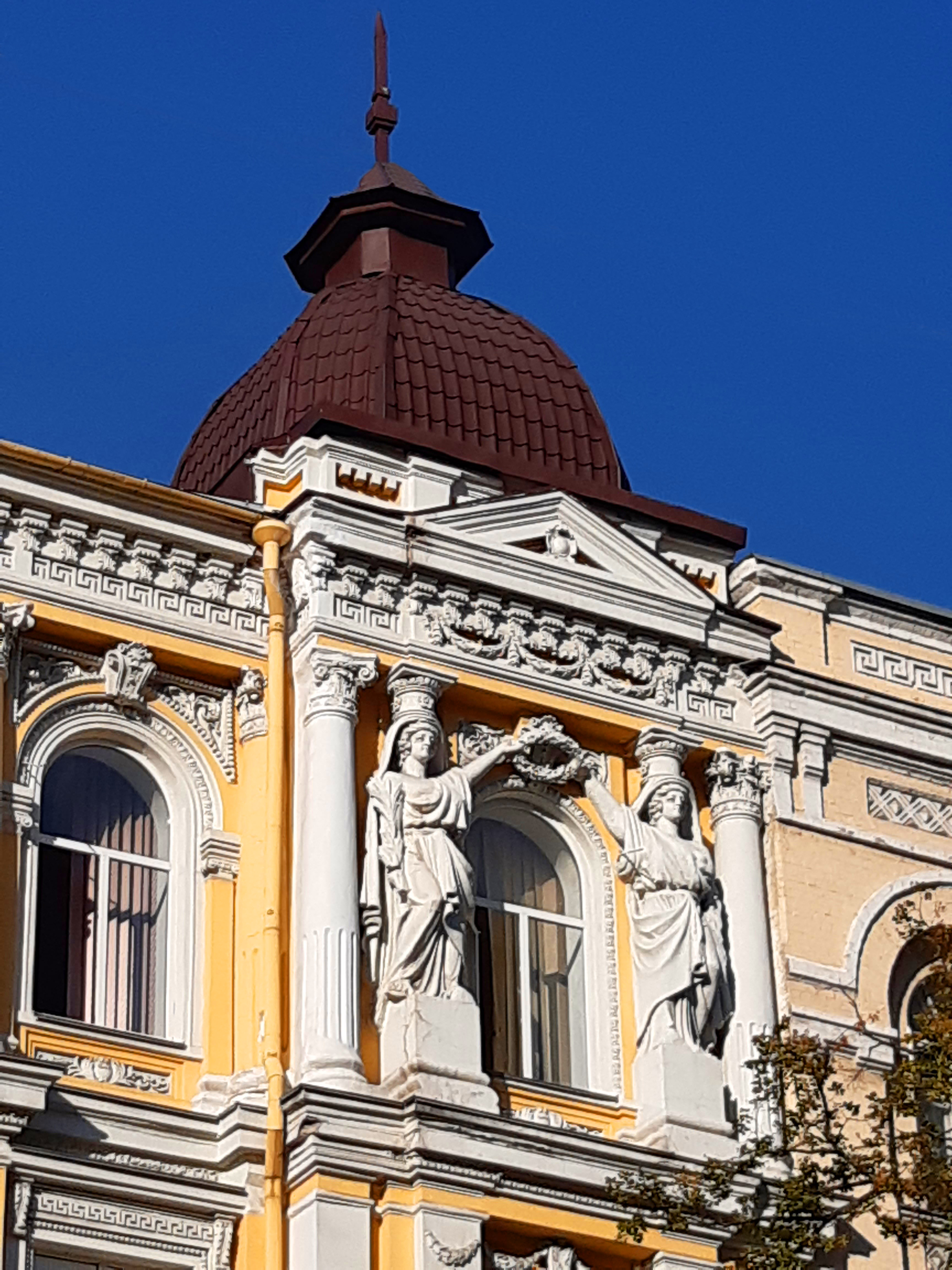 Каріатиди. Садиба Шампаньєра, Київ, вул. Богдана Хмельницького, 44